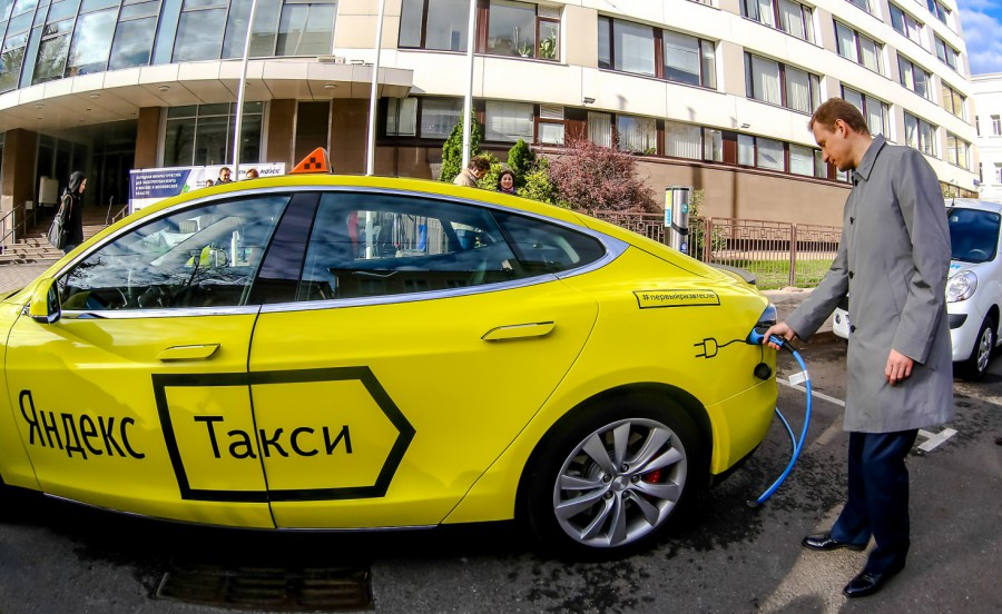 Автомобиль Tesla (Яндекс.Такси) в процессе зарядки.